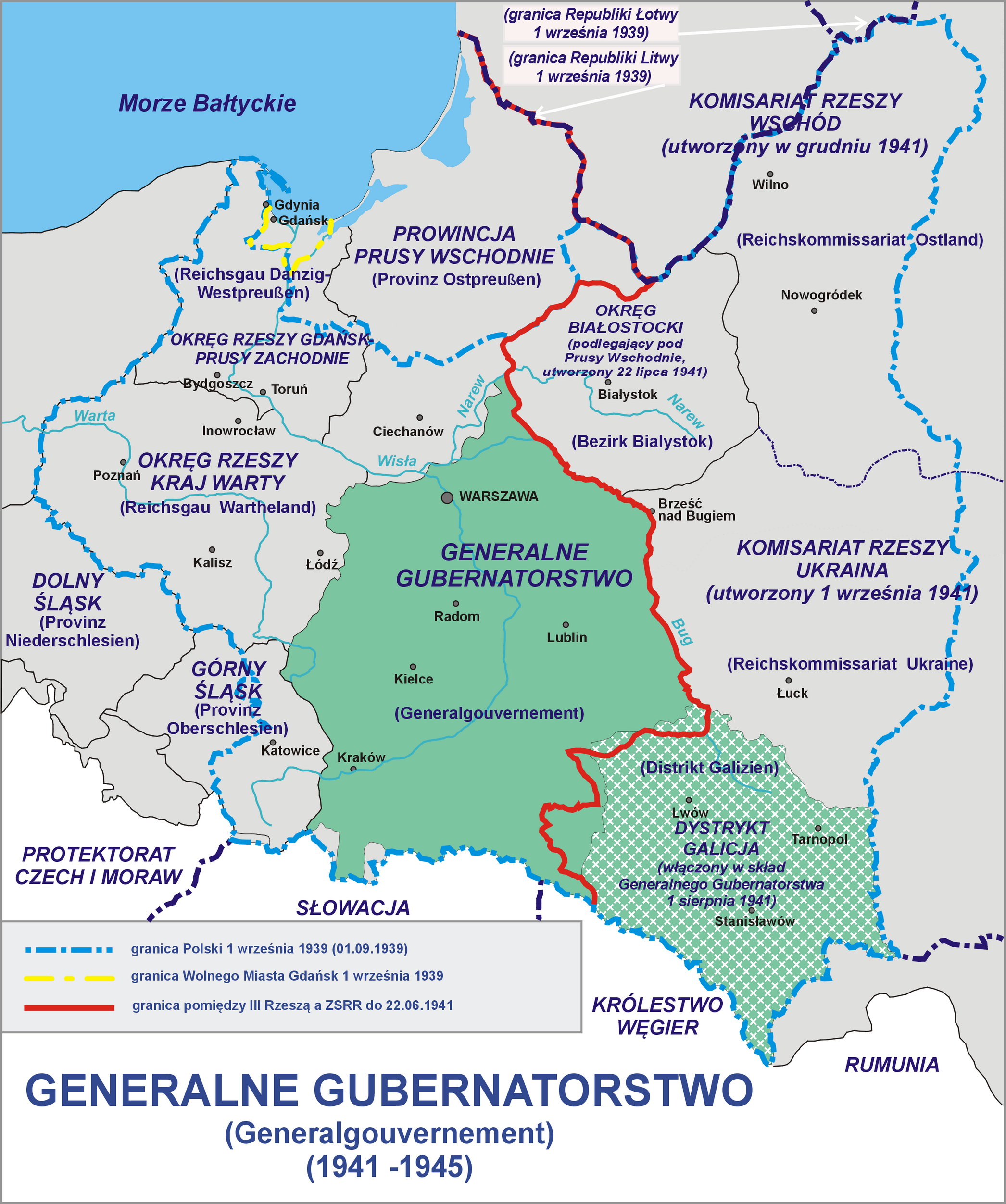 Generalne Gubernatorstwo (Generalgouvernement) 1942 - 1945